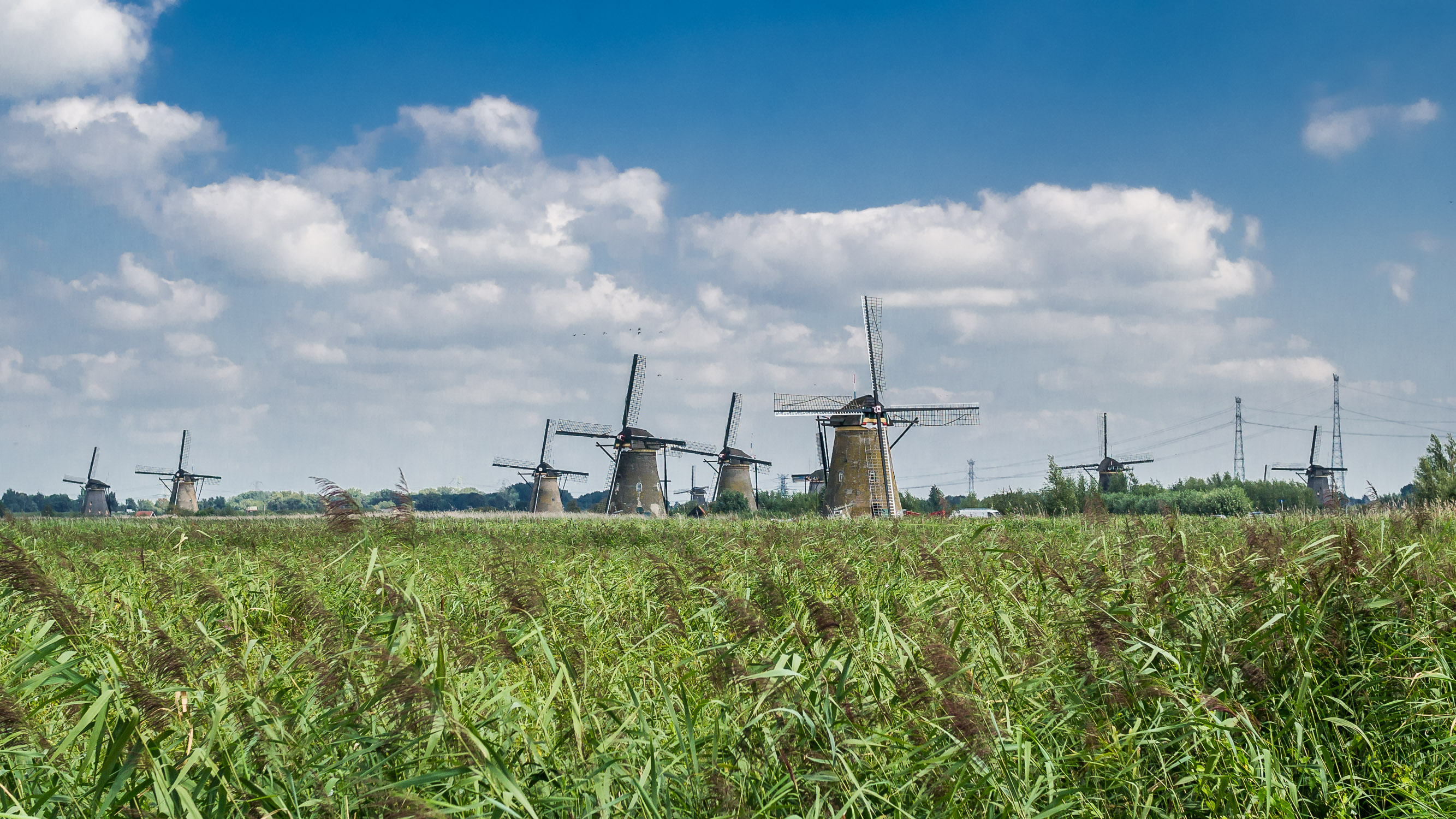 10 molens van de kinderdijk. De dichtstbijzijnde molen is monument nummer 30550.